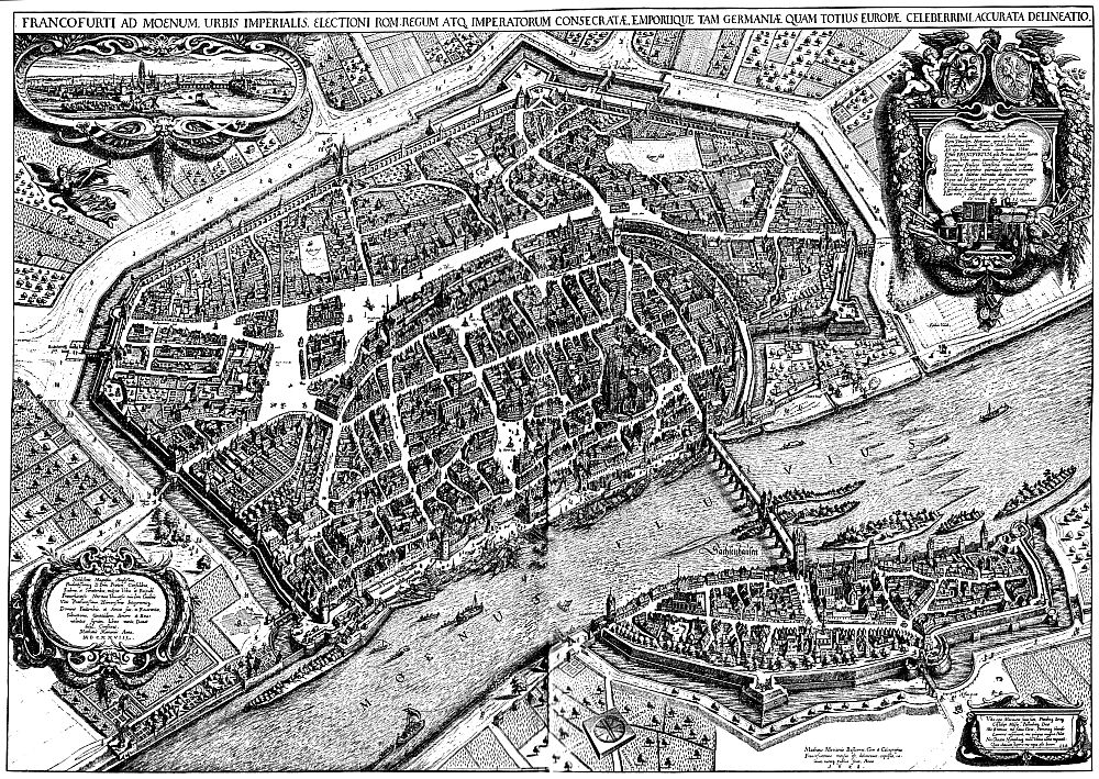 Frankfurt am Main im Jahre 1628